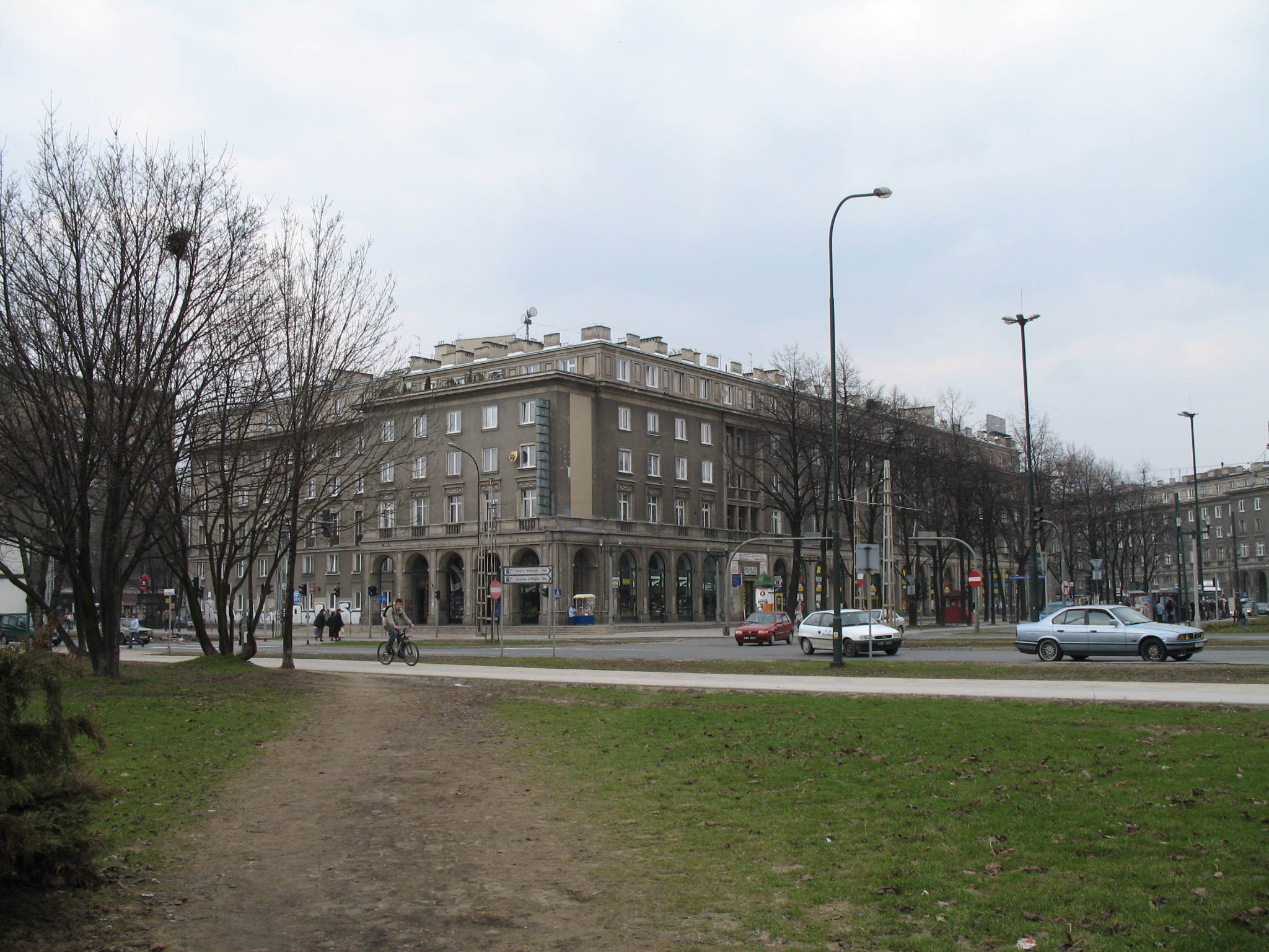 Kraków - plac Centralny